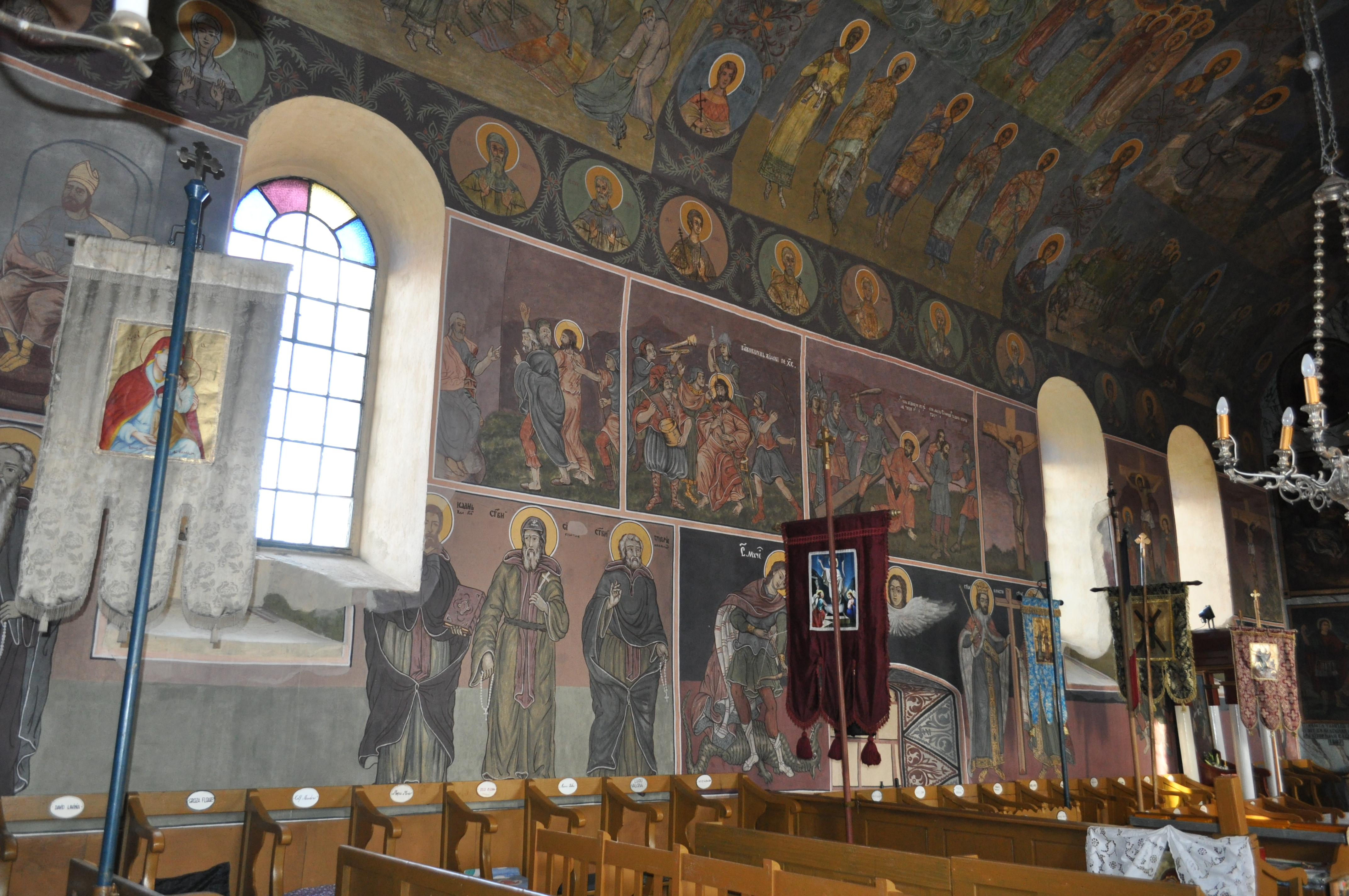 Biserica „Nașterea Născătoarei de Dumnezeu" din Hălmagiu, județul Arad